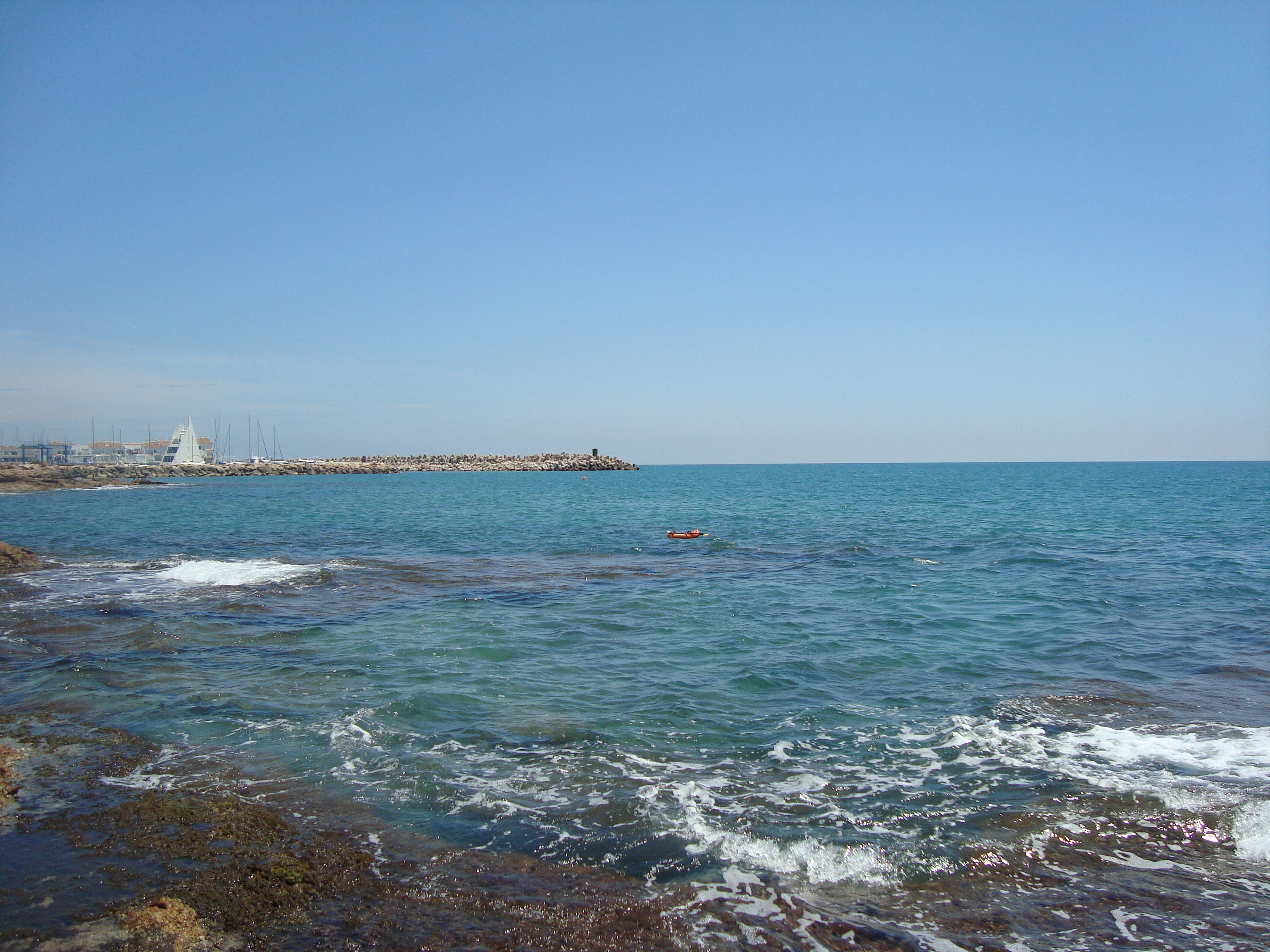 Costa del Azahar (Alcossebre, Castellón).